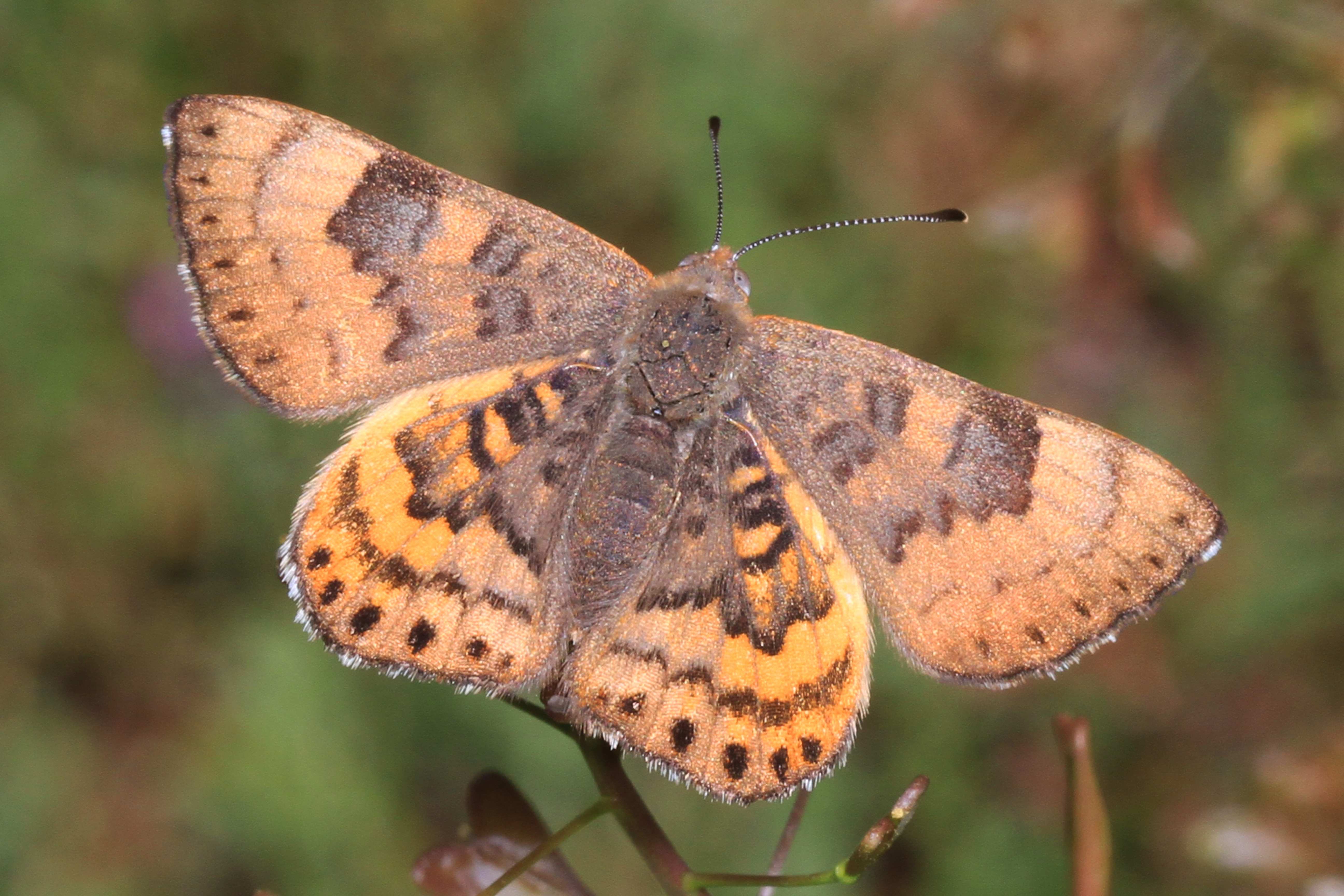 Zela Metalmark - Emesis zela, V-bar-V Ranch, Rimrock, Arizona